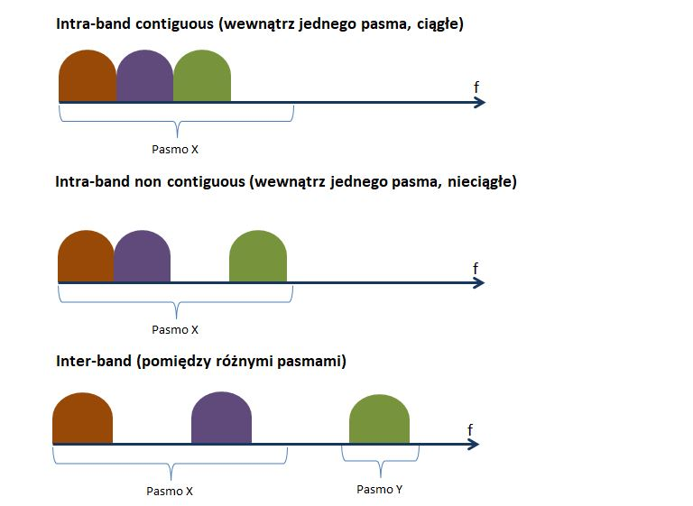 Scenariusze agregacji pasma w LTE